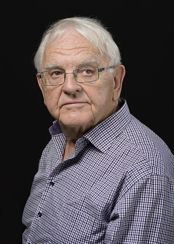 Pierre-André Blaser, chanteur (ténor) et enseignant, né à Saint-Prex en 1937. Portrait réalisé à la BCU Lausanne, le 2 septembre 2015.